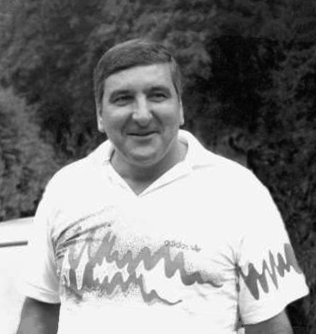 Rică Răducanu